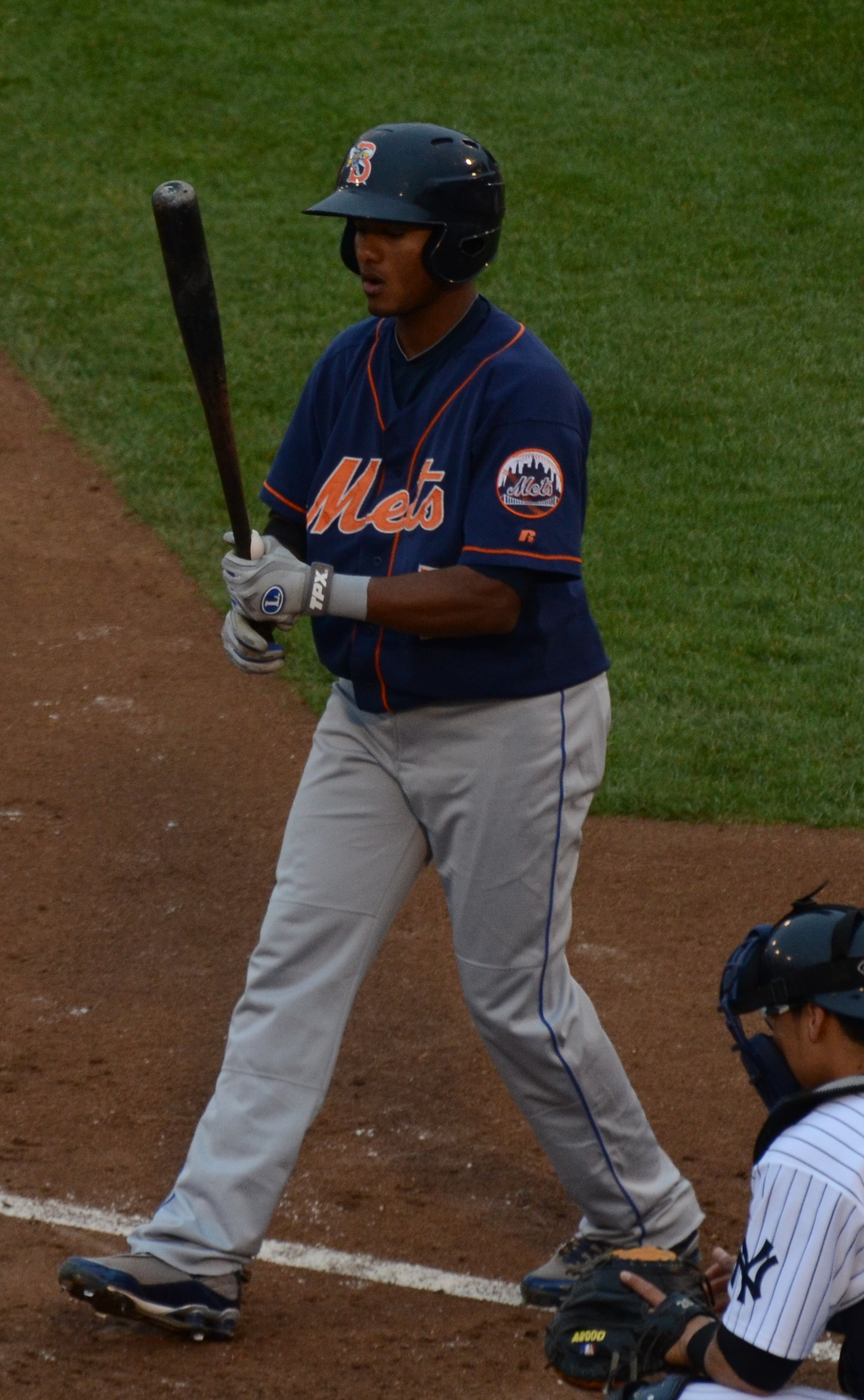 Jordany Valdespin